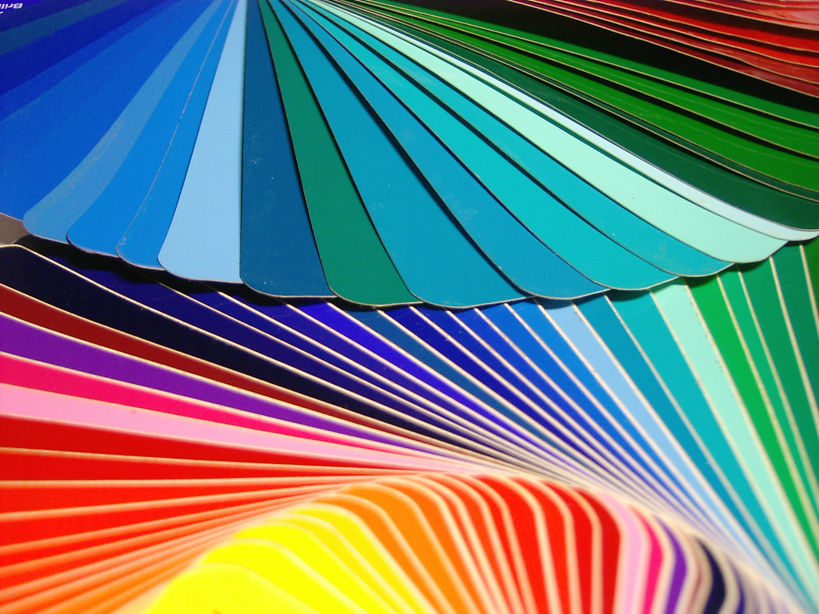 Farbfächer mit Musterfarben von Beschriftungsfolien